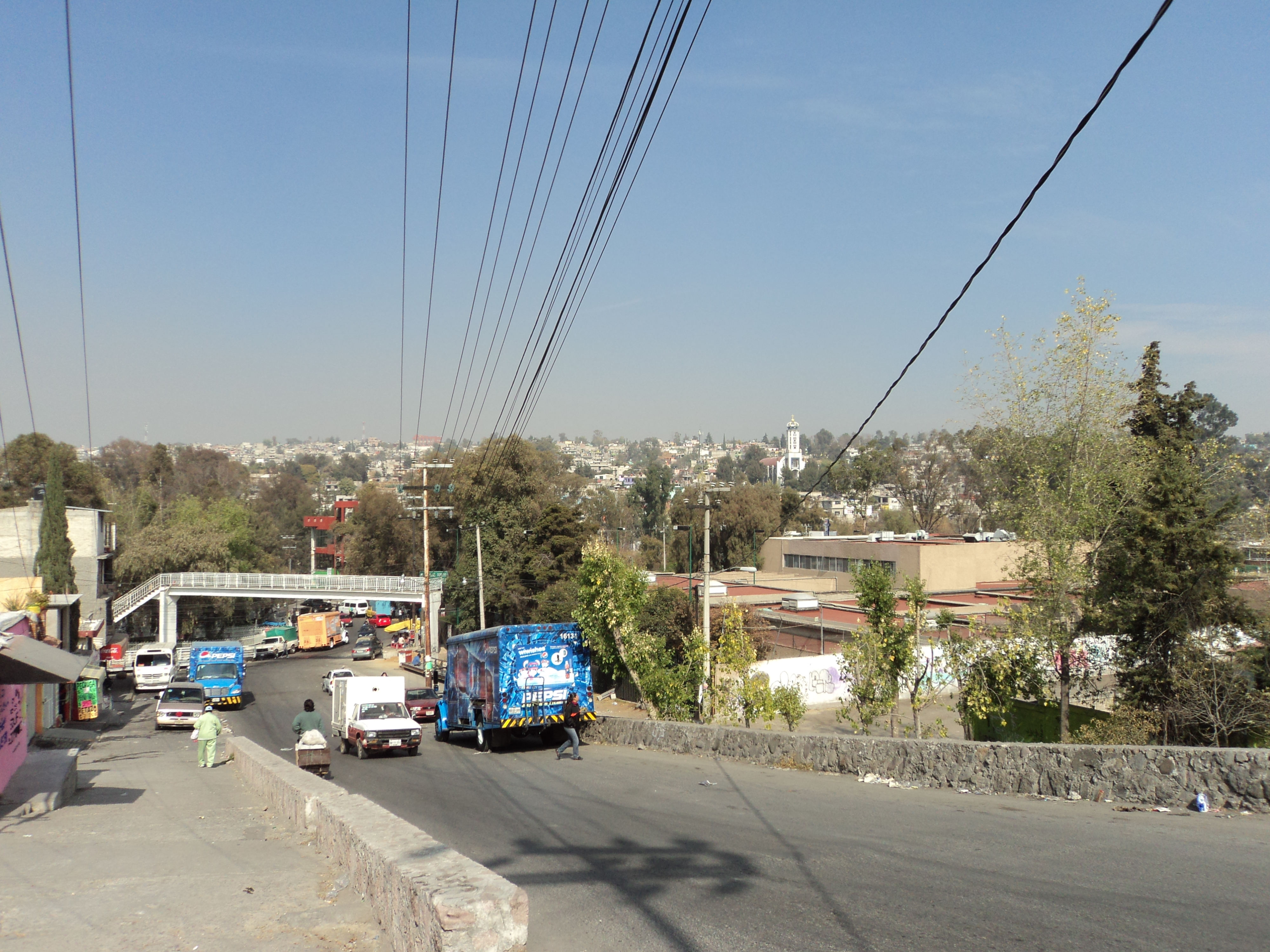 SAN ILDEFONSO